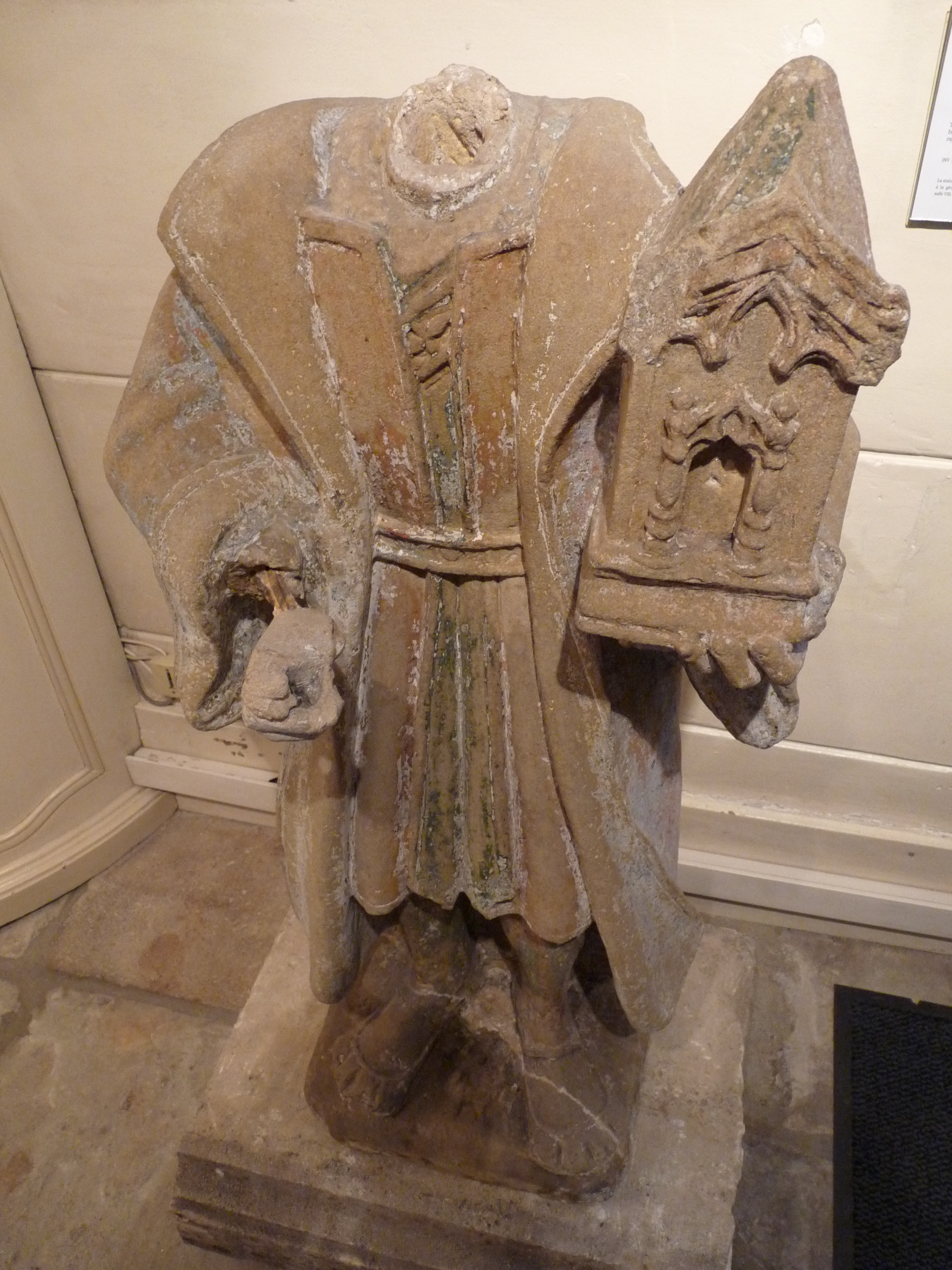 Statue en pierre (XVIIe siècle) de saint Romaric (Musée Charles de Bruyères, Remiremont). Polychrome à l'origine, la statue se trouvait dans l'ancien hôpital construit en 1724 et détruit en 1974.